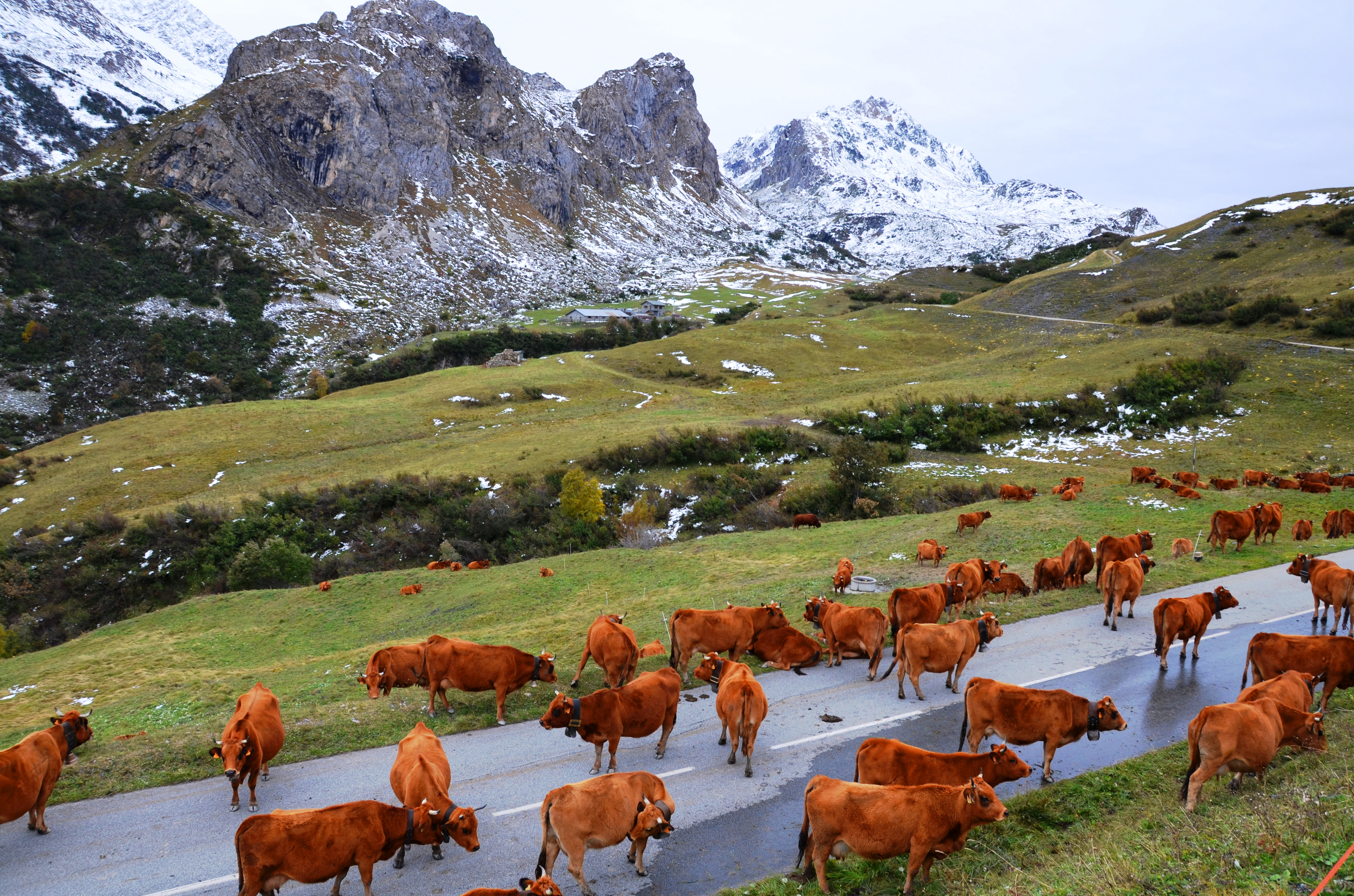 Les Chapieux, Bourg-Saint-Maurice, França